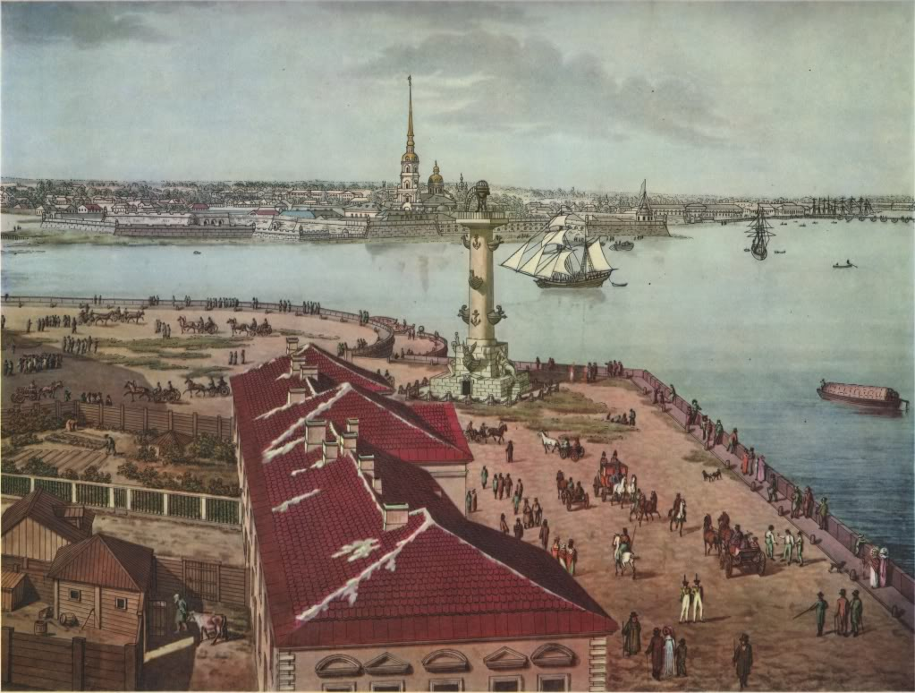 А. Тозелли. Панорама Петербурга. Акварель. 1820. Лист 9. Южная Ростральная колонна и вид на Петропавловскую крепость.